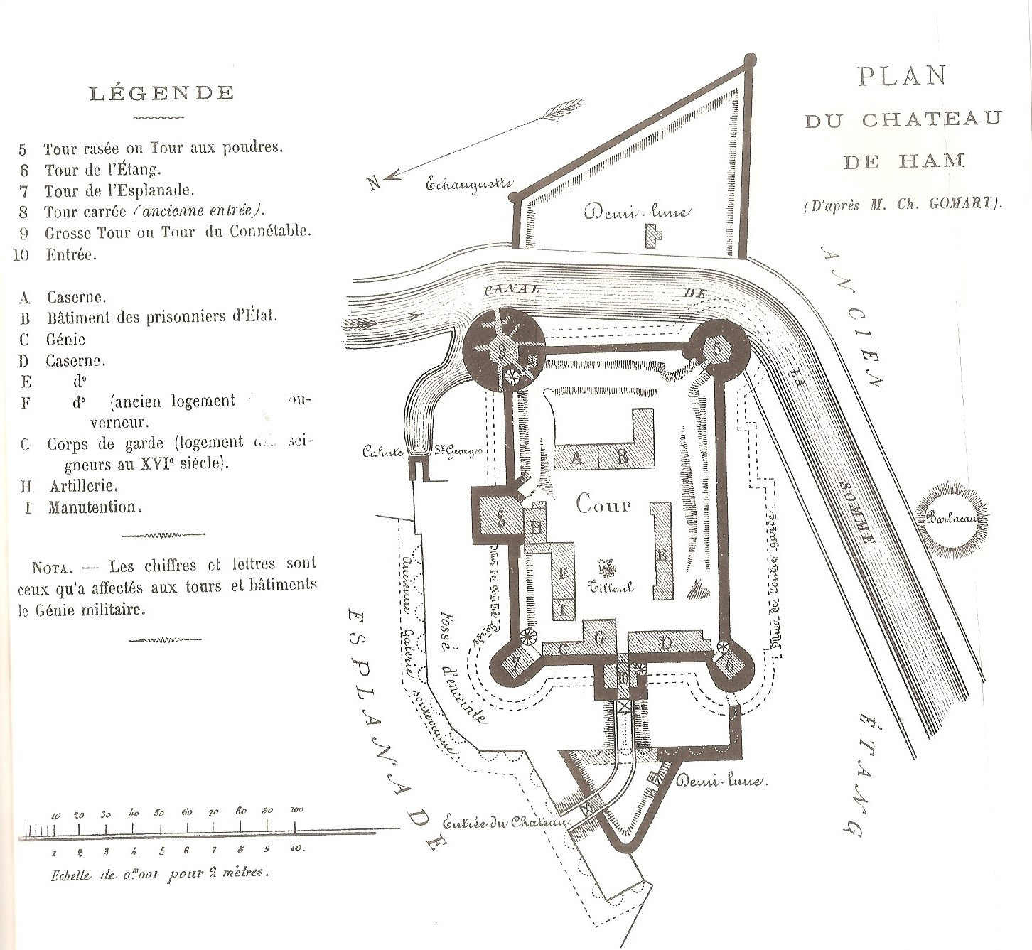 Château de Ham (Somme), avant 1917 (plan)